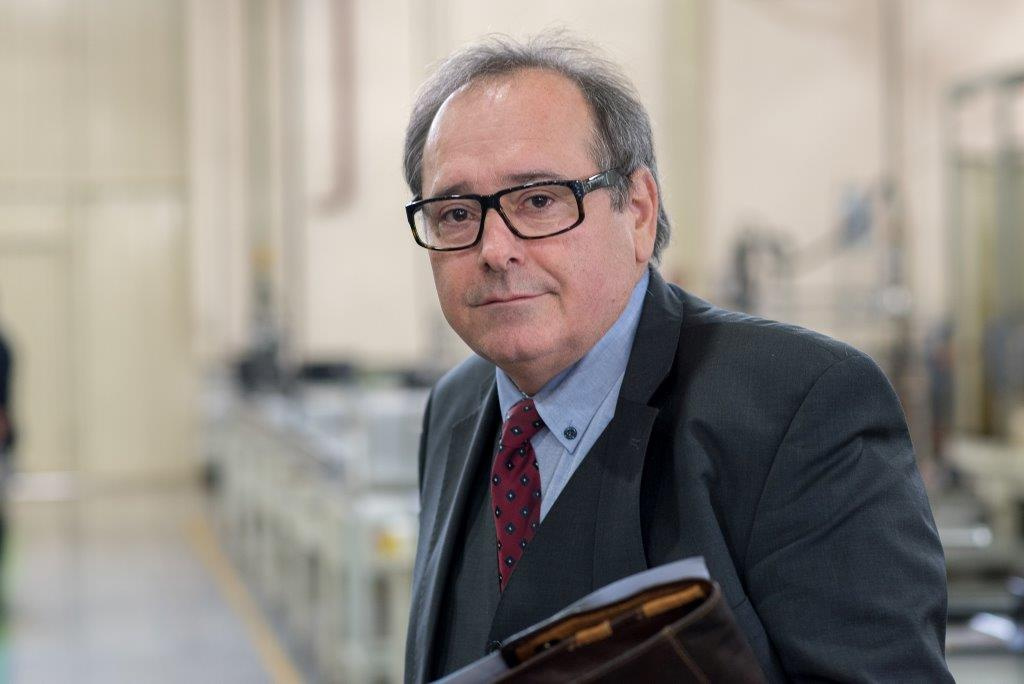 Werksbesuch